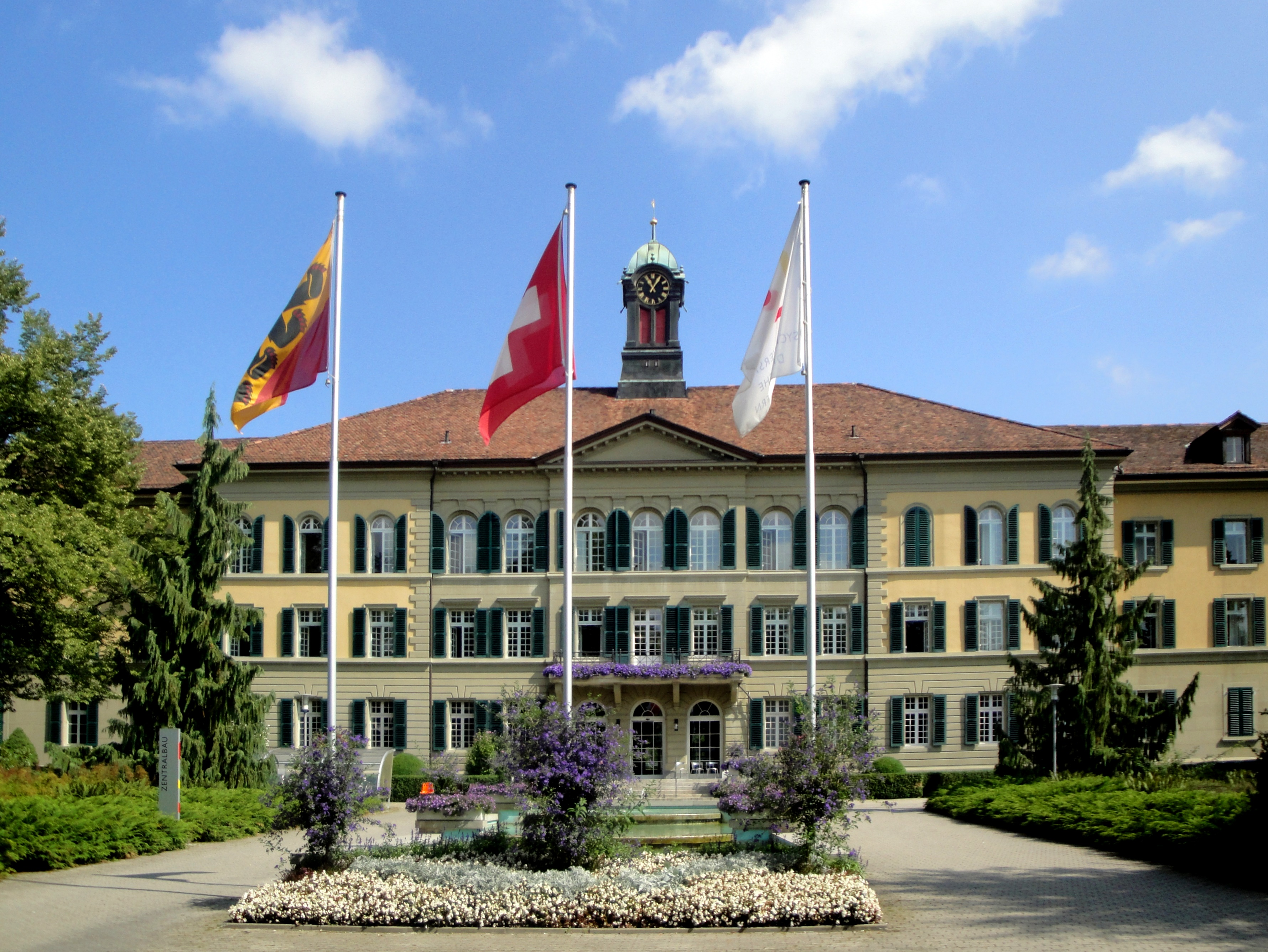 Bern Waldau, Zentralgebäude